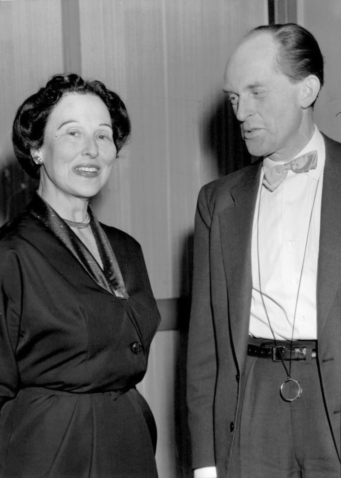 Professorskan Eva Montgomery och kammarherre Erik Trolle. Vårt arbete i Stockholmsavdelningen av föreningen Östergötlands barn inriktas på att samla pengar till stipendier till konstnärer av östgötahärkomst, berättade föreningens ordförande professorskan Eva Montgomery i samband med årsmötet som hölls på Margaretaskolan vid Norrmalmstorg på onsdagskvällen. I våras kunde vi lämna ett stipendium till en ung konstnär som studerar vid Konstakademien.